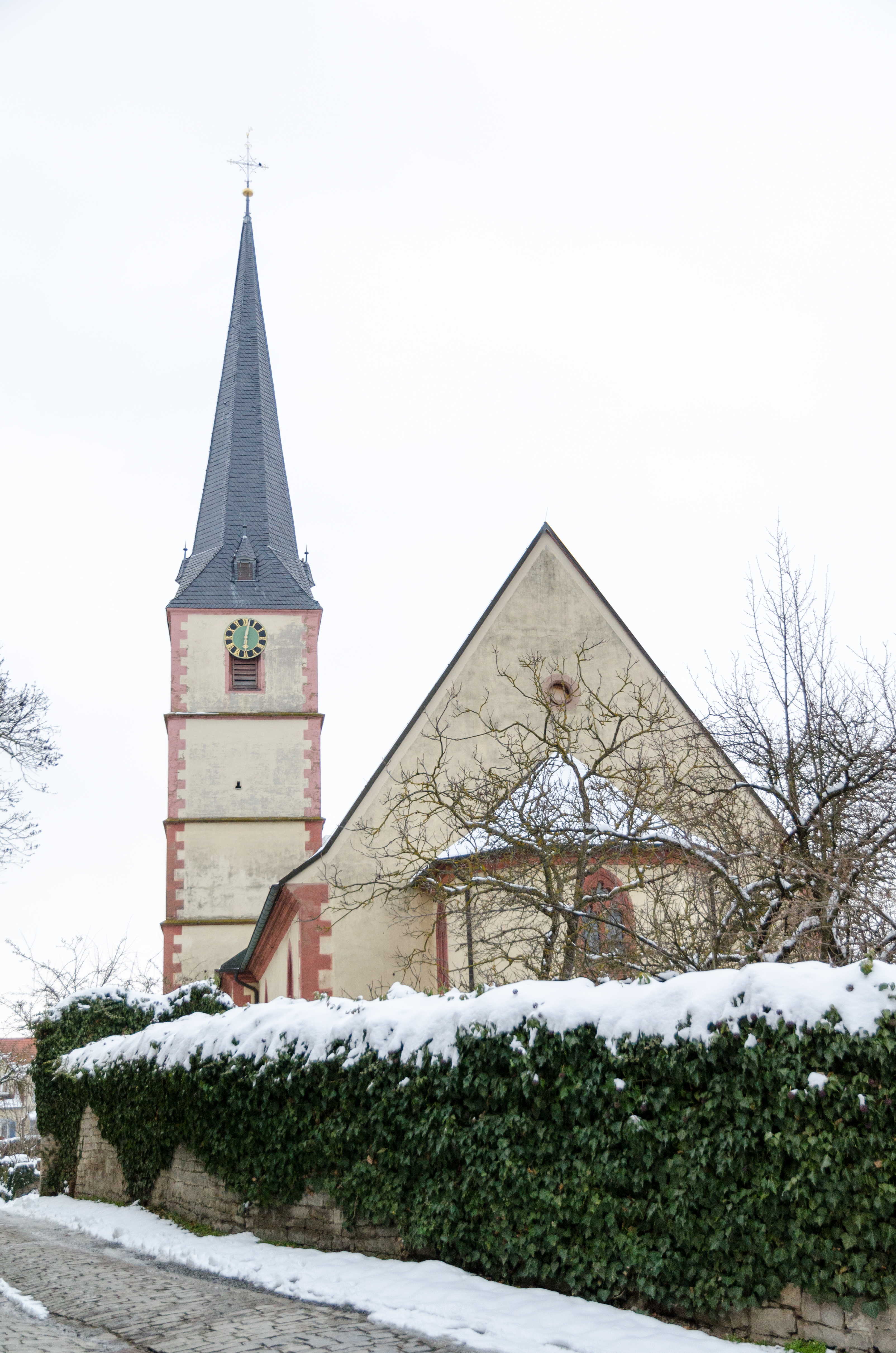 Sulzfeld, Kirchplatz, Pfarrkirche